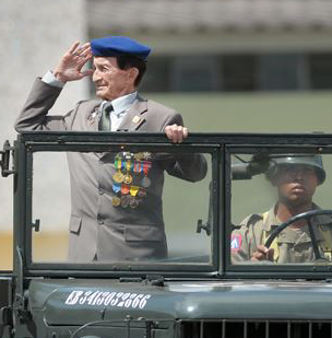 Veterano Nestor da Silva em Carro de Combate